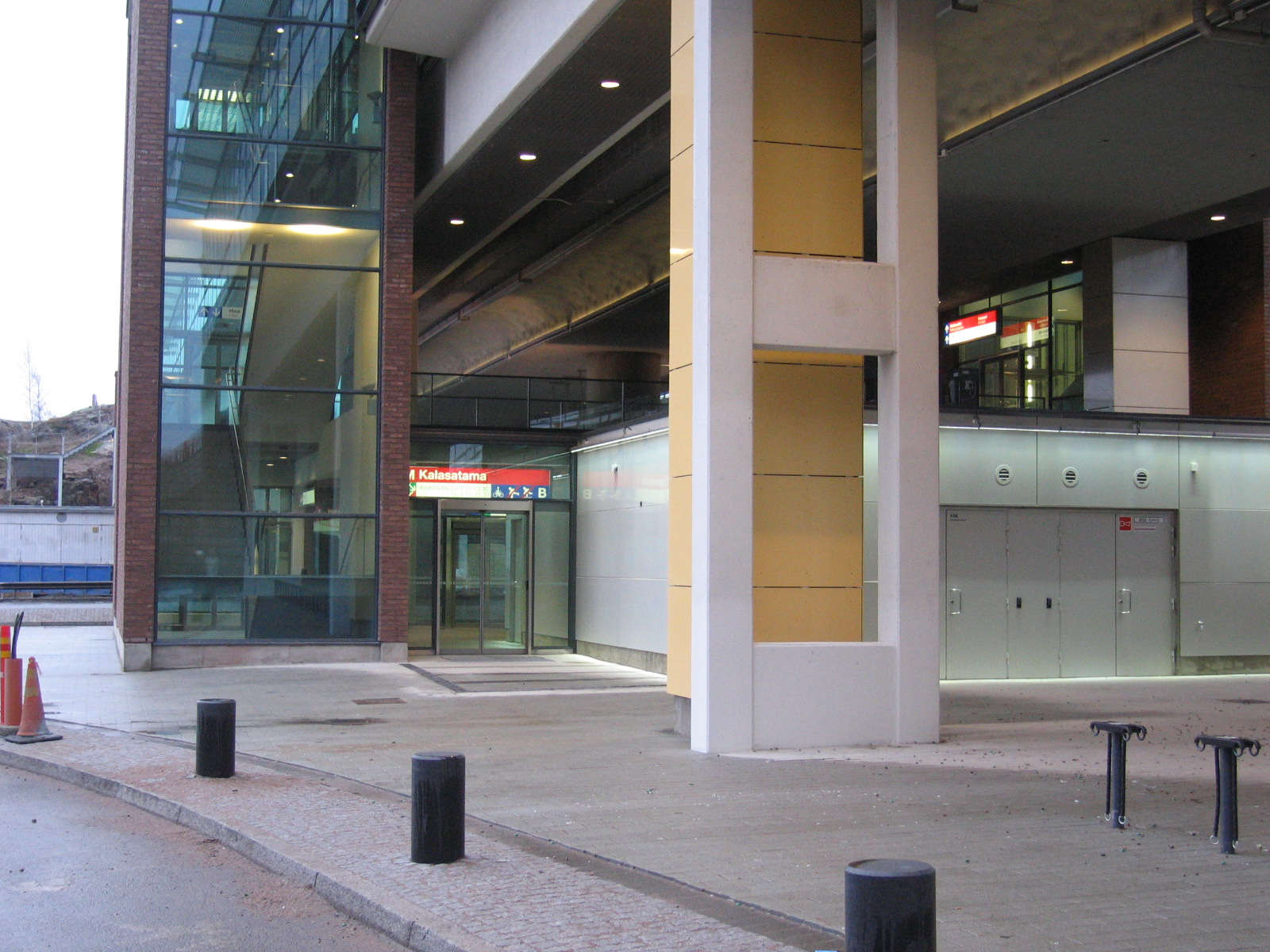 Kalasatama (Fish Harbour) metrostation in Helsinki